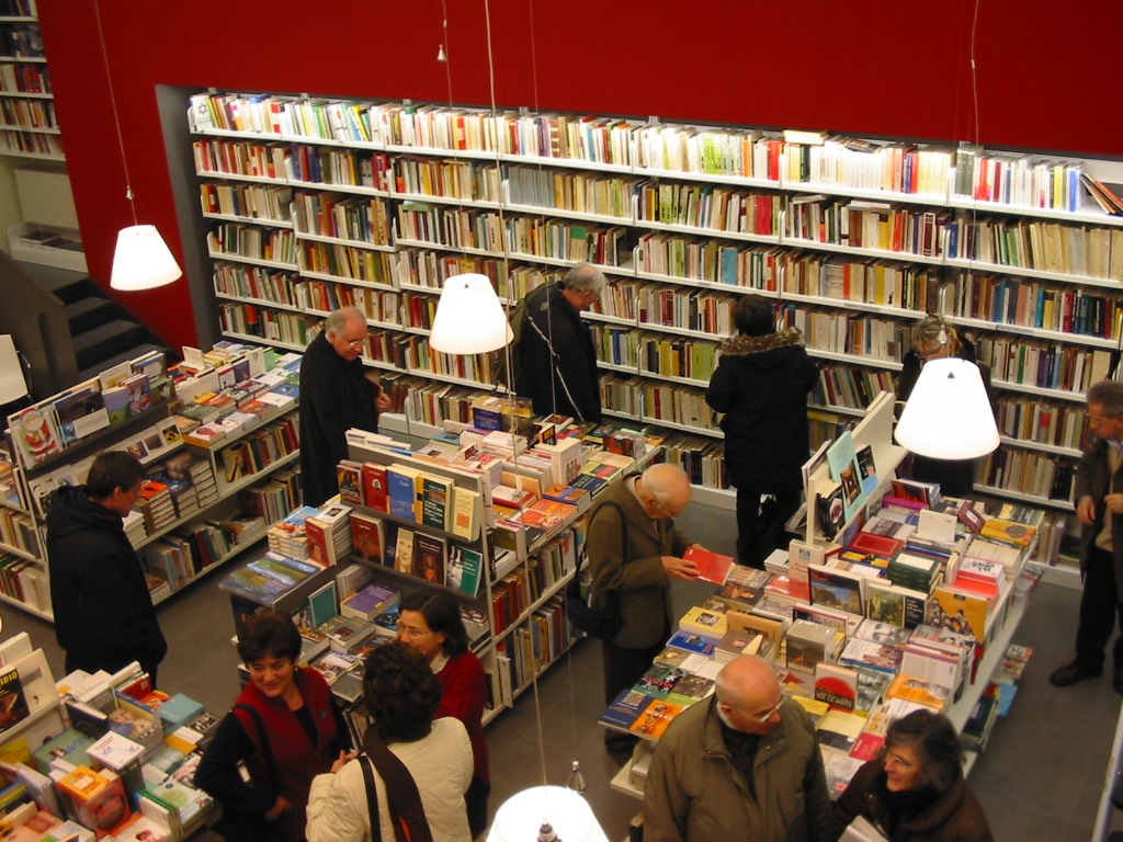 Archivio Claudiana srl, Intero della libreria di Milano